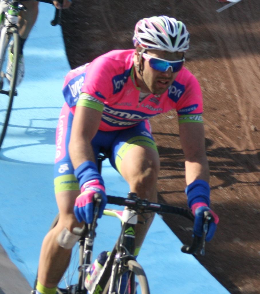 Paris-Roubaix 2013, vélodrome de Roubaix Andrea Palini